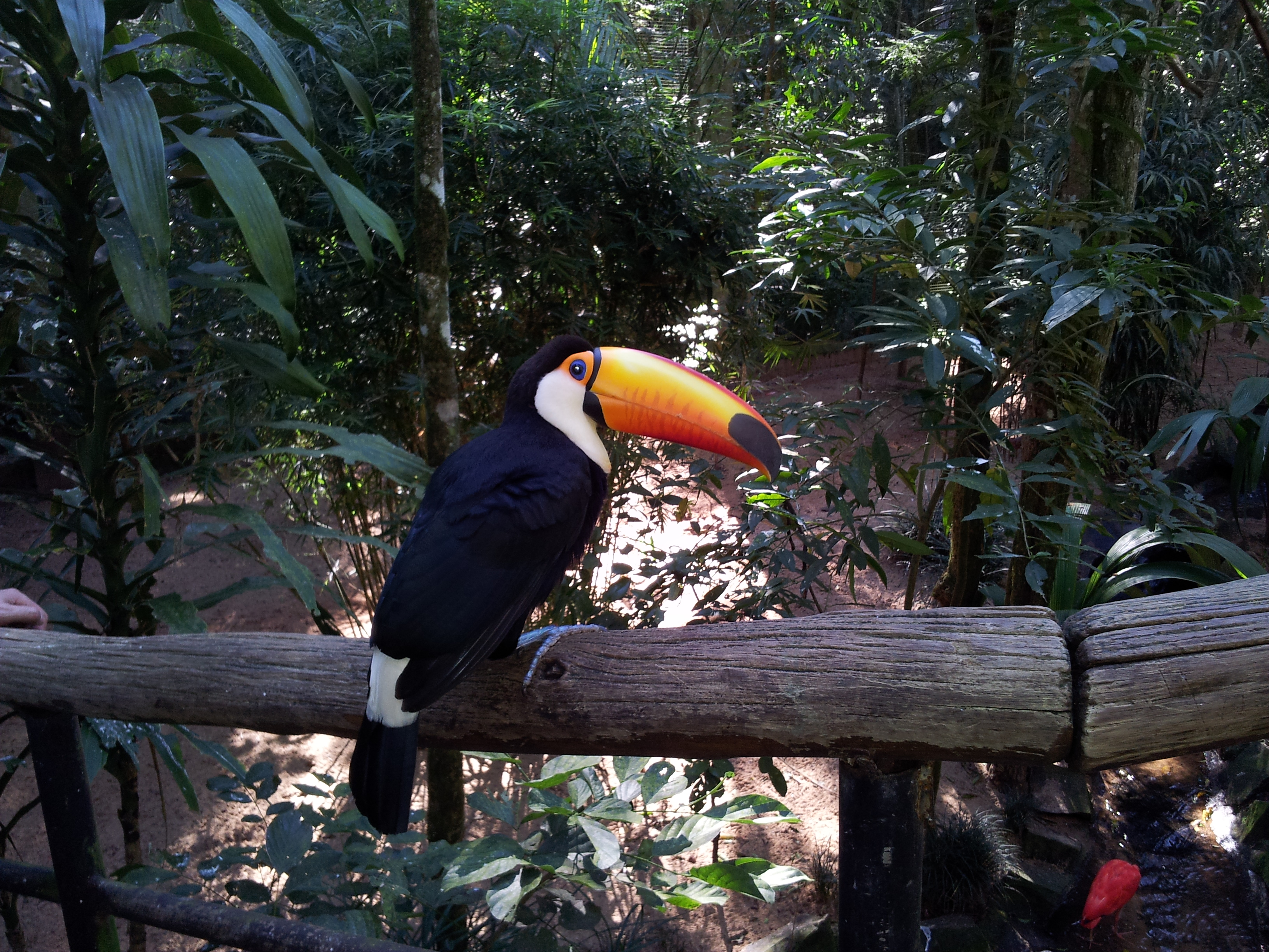 Tucano, no Parque das aves - Foz do Iguaçú - PR